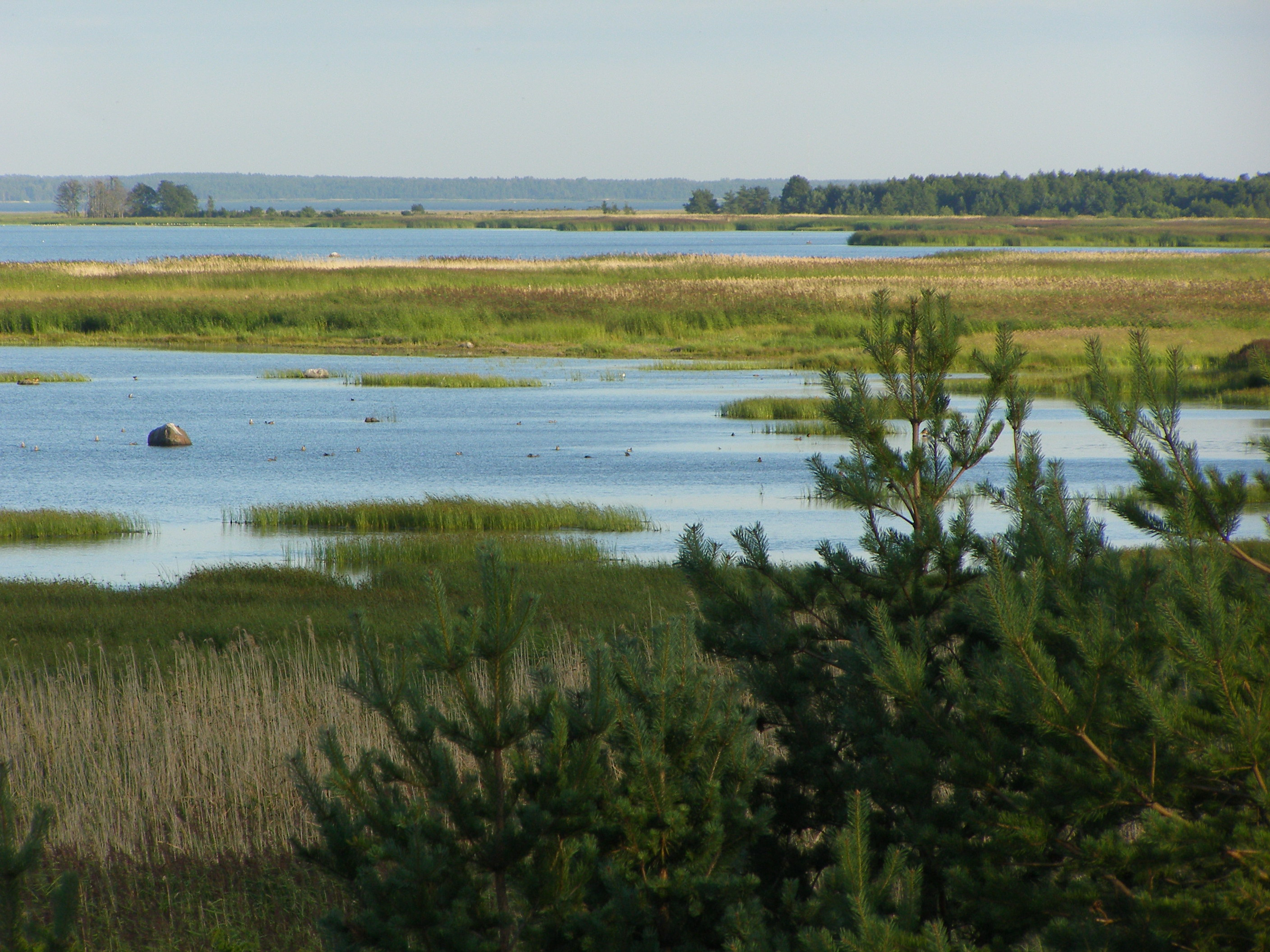 Vormsi idaosa rannaniit